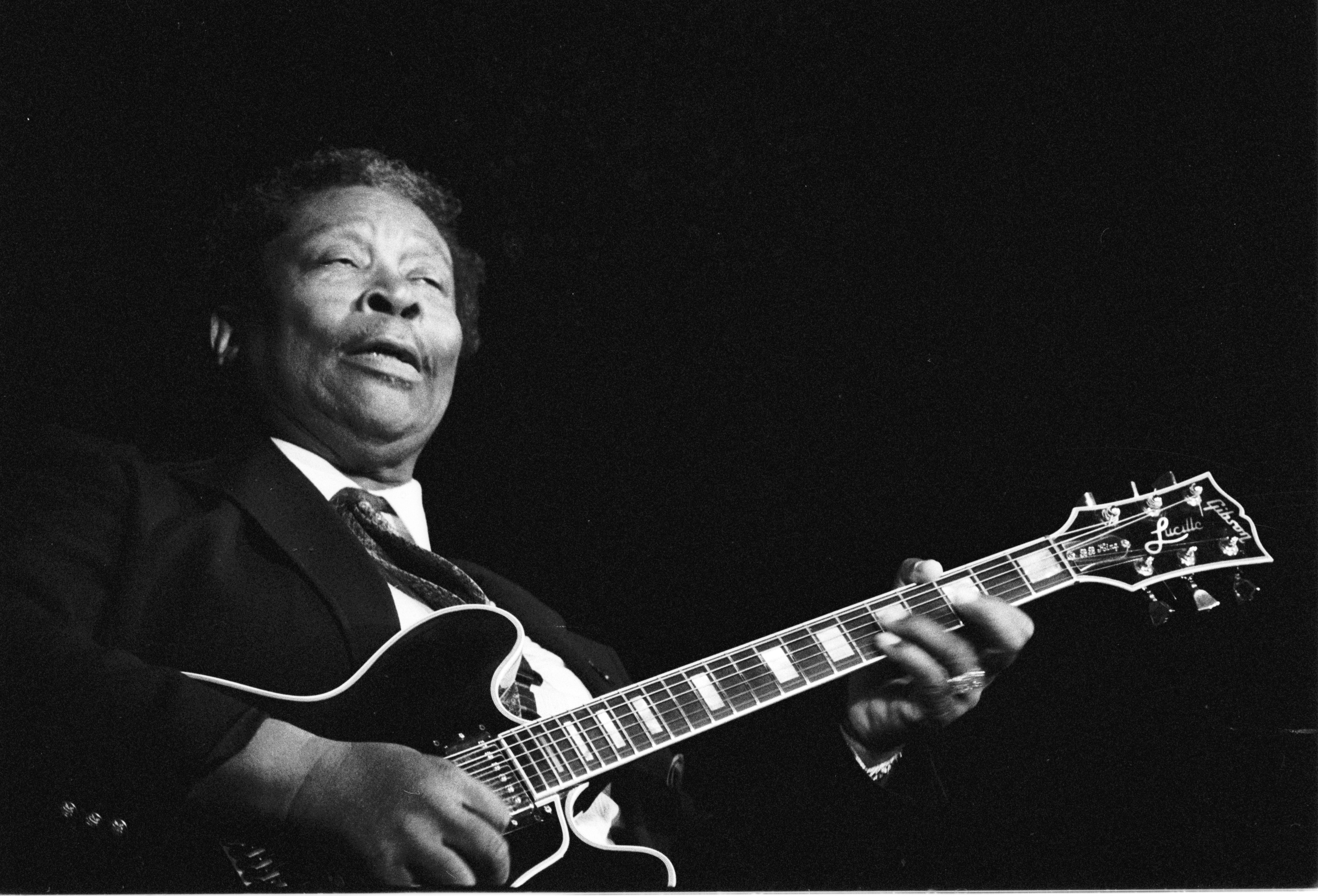 Le bluesman américain B. B. King en concert à Deauville (Normandie, France) en 1989.